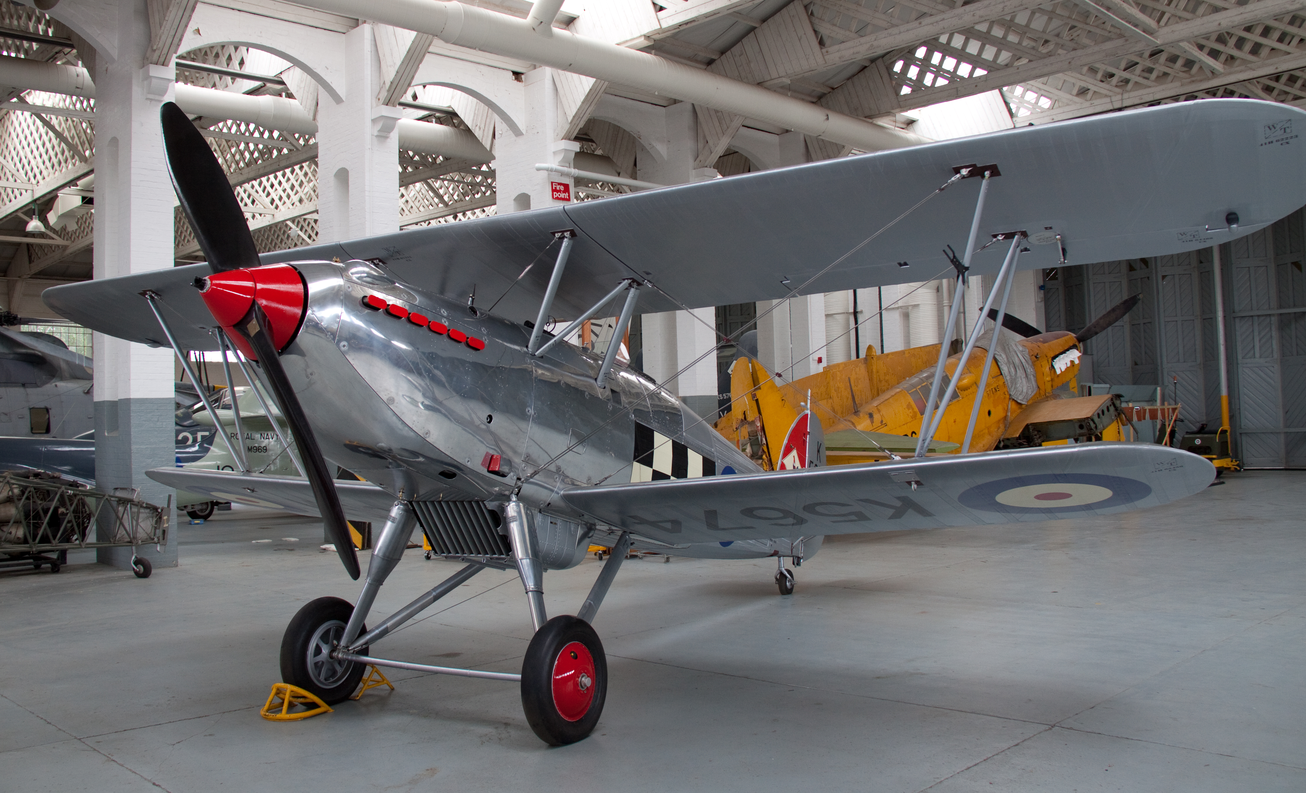 Hawker Fury MkI K5674 in hanger 2